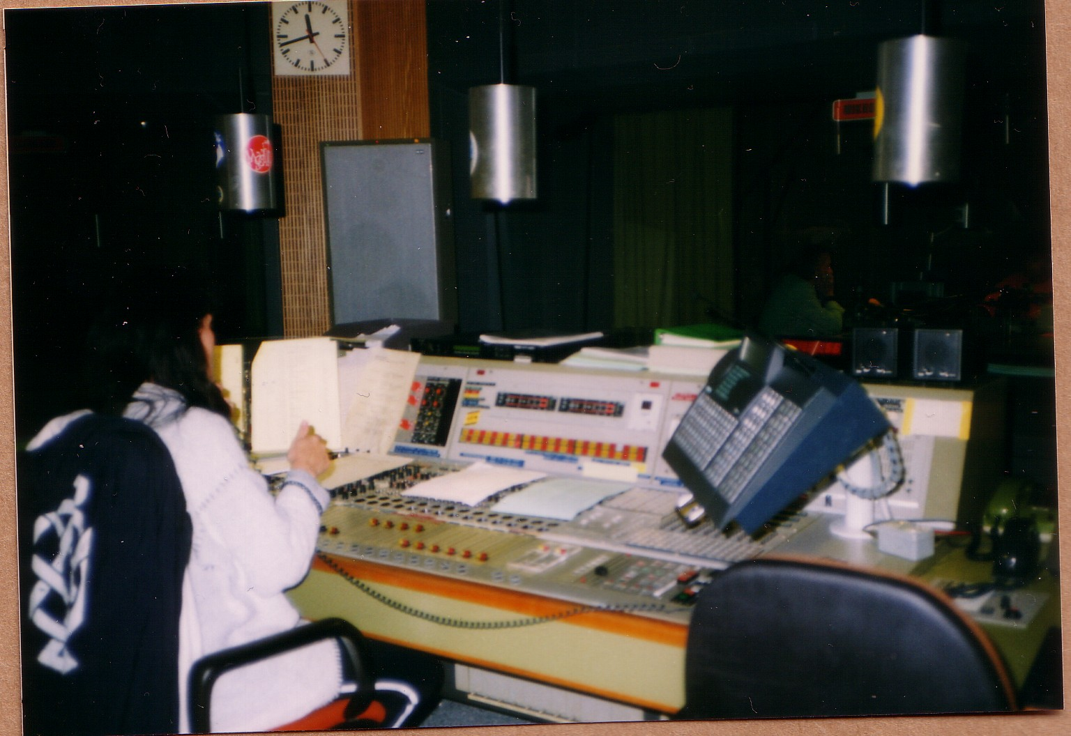 Tonstudio des SDR-Radios, Stuttgart 1995